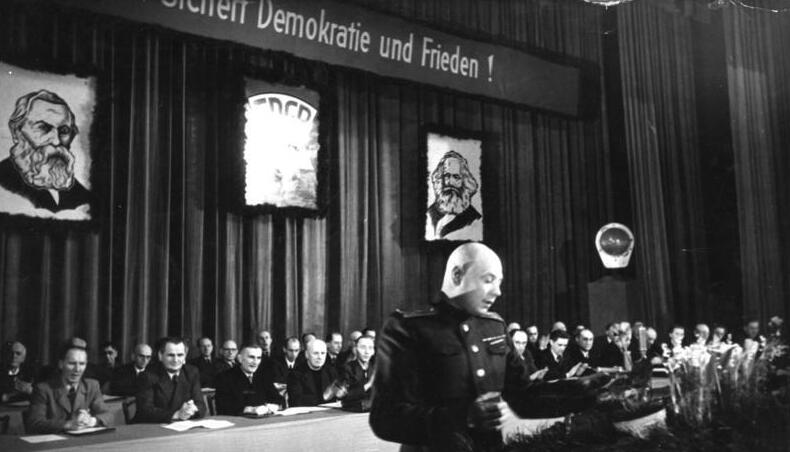 Berlin, FDGB-Kongreß, Oberst Tulpanow spricht Zentralbild 1. Bundeskongreß des FDGB für die sowjetische Besatzungszone in Berlin am 9.-11.2.1946 im Berliner Admiralspalast. U.B.z.: Oberst Tulpanow, Leiter der politischen Abteilung der Sowjetischen Militäradministration, bei seiner Rede. 211-46 Abgebildete Personen: Tulpanow, Sergej Prof.: Leiter der politischen Abteilung der SMAD, Prorektor Universität Leningrad, Sowjetunion